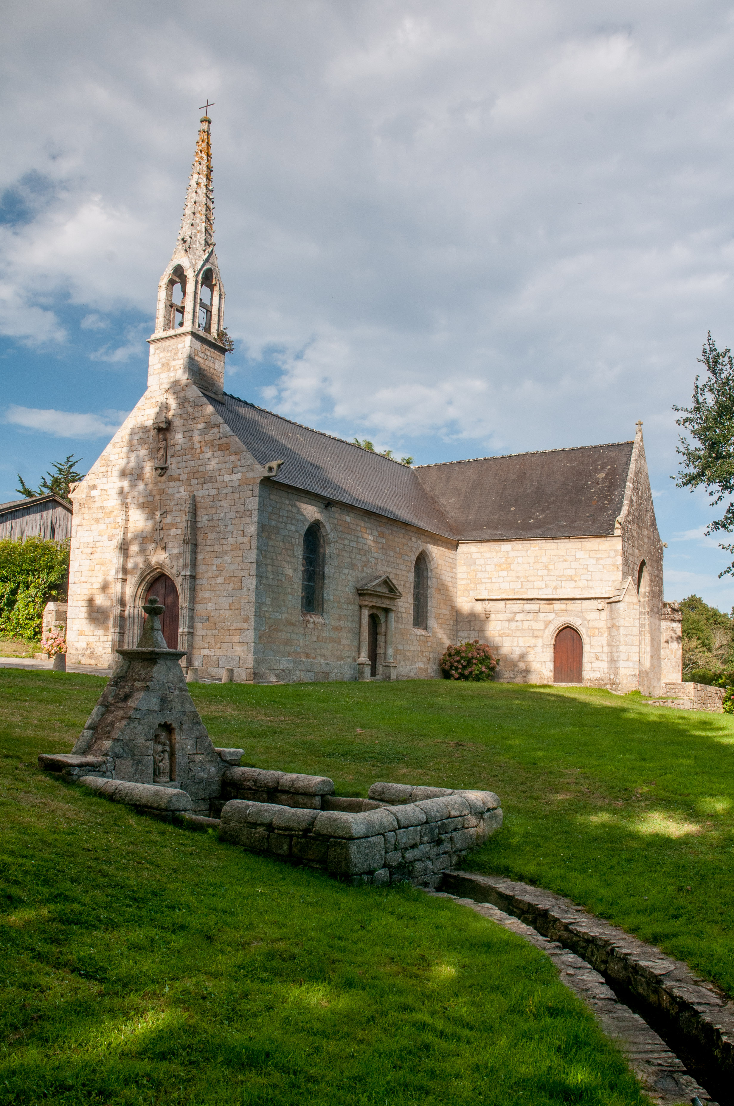 chapelle st-mathieu de guidel, bretagne, france .